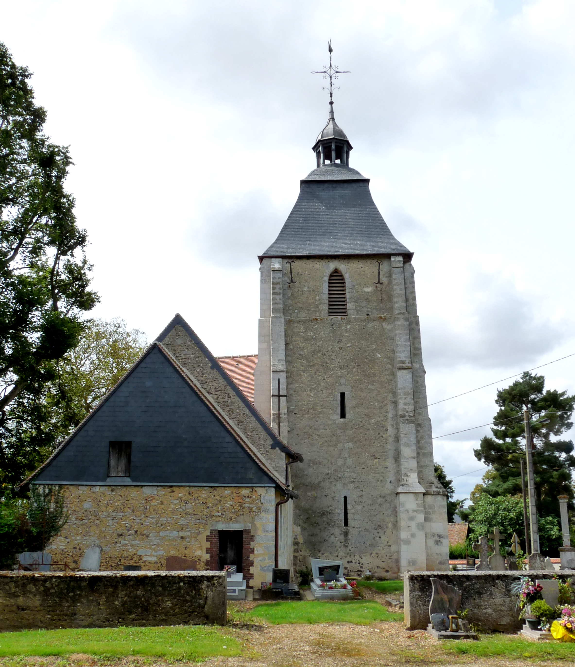 Église Notre-Dame de Bretagnolles